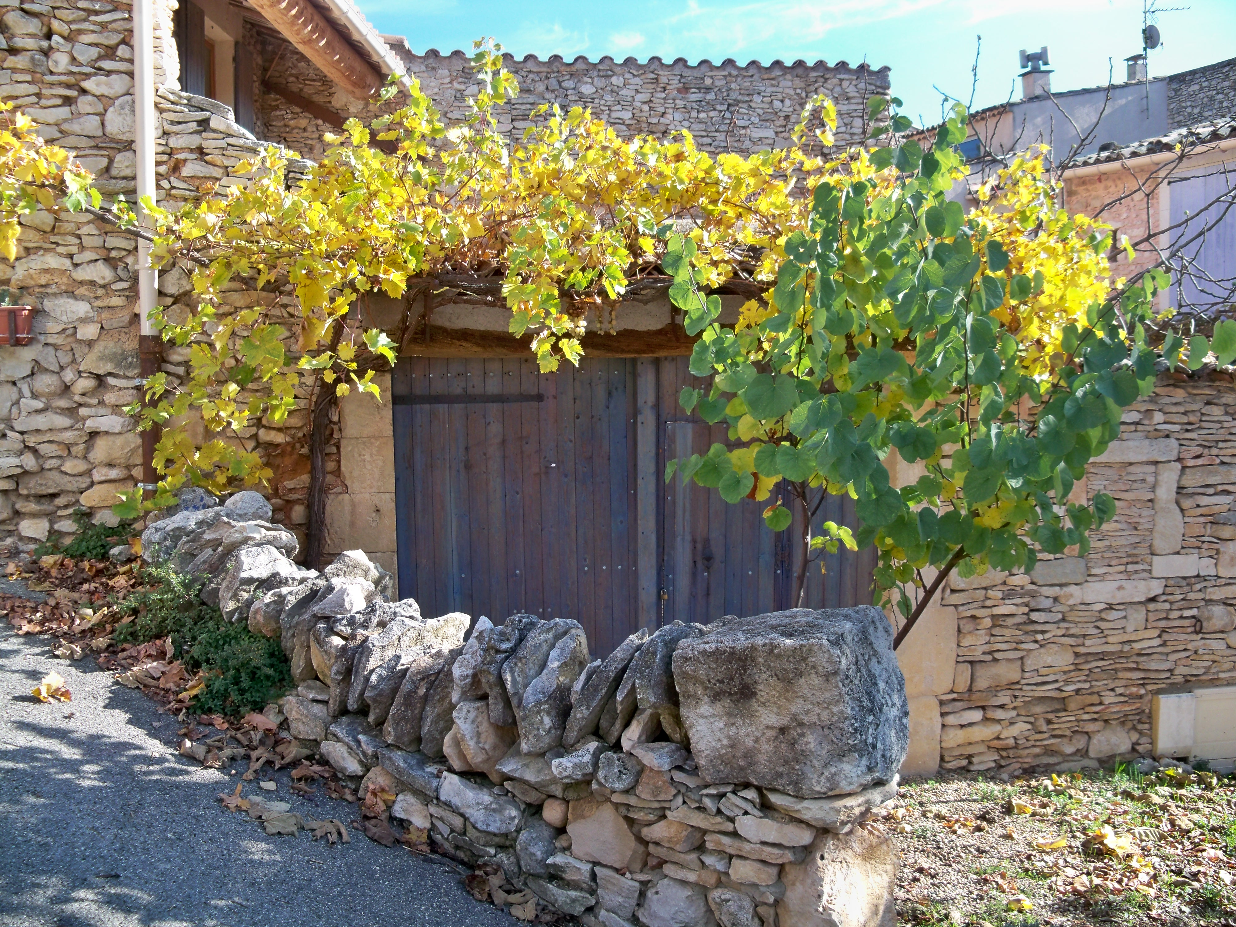 Treille à Grand Clément, Vaucluse, France